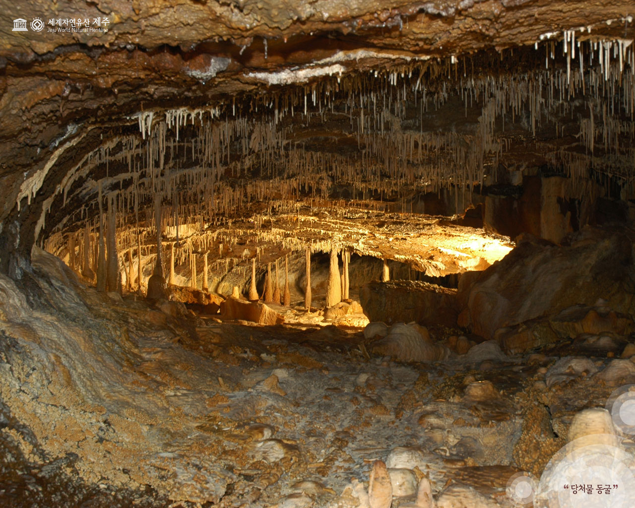 Dangcheomuldonggul Lava Tube